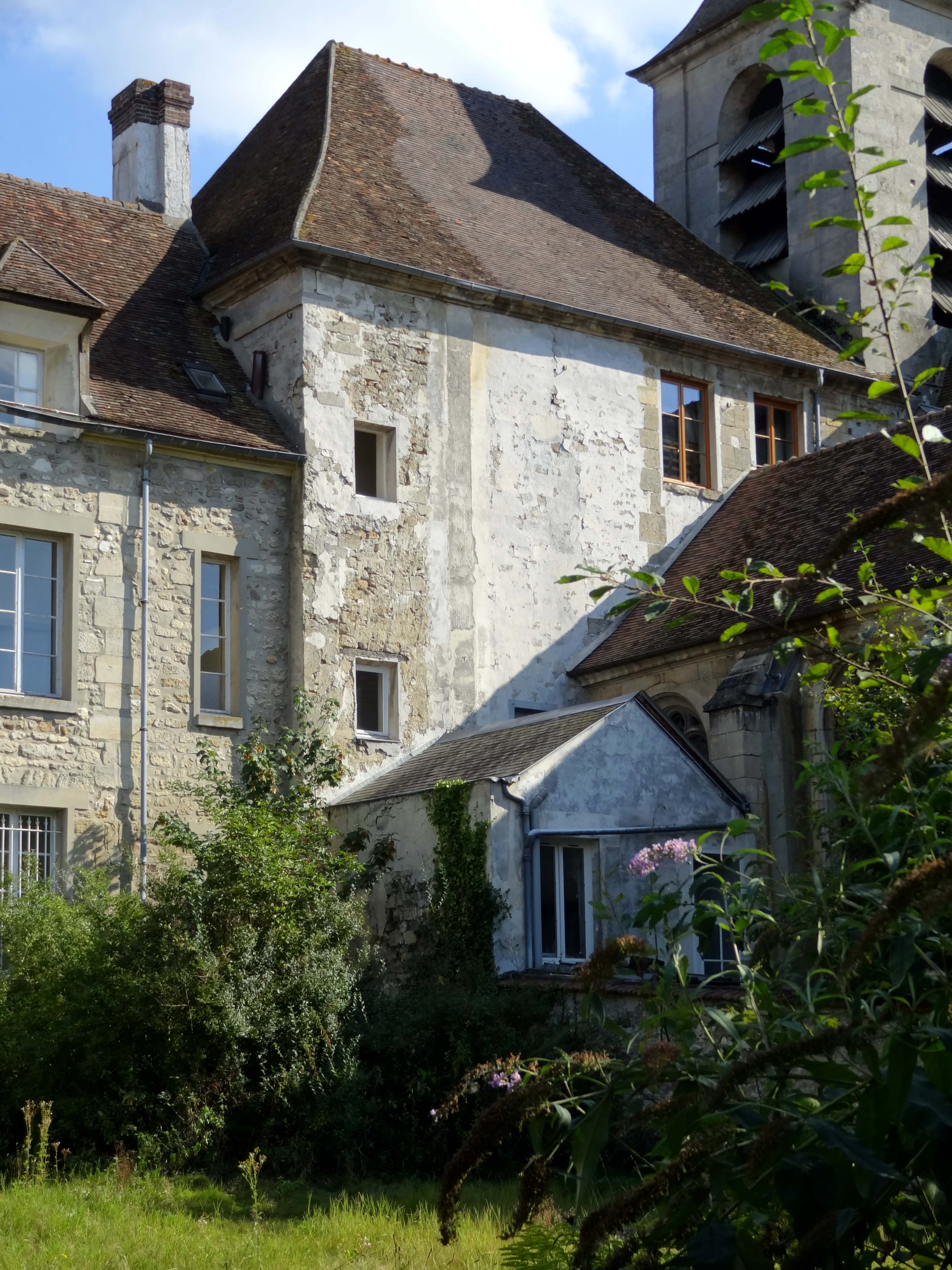 Église Saint-Rémi de Marines - voir titre.